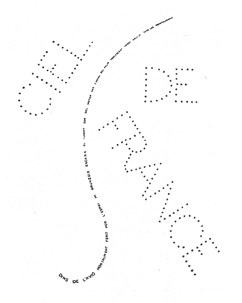 "Oda a Guynemer", de Josep Maria Junoy. Primer cal·ligrama avantguardista en llengua catalana. Transcripció: "CIEL DE FRANCE / dins de l'avió mortalment ferit per l'espai hi brunzeix encara el lluent cor del motor mes l'anima del palid adolescent heroi vola ja vers les constelacions" [transcripció del text original de 1915, encara no adaptat a la normativa fabriana]